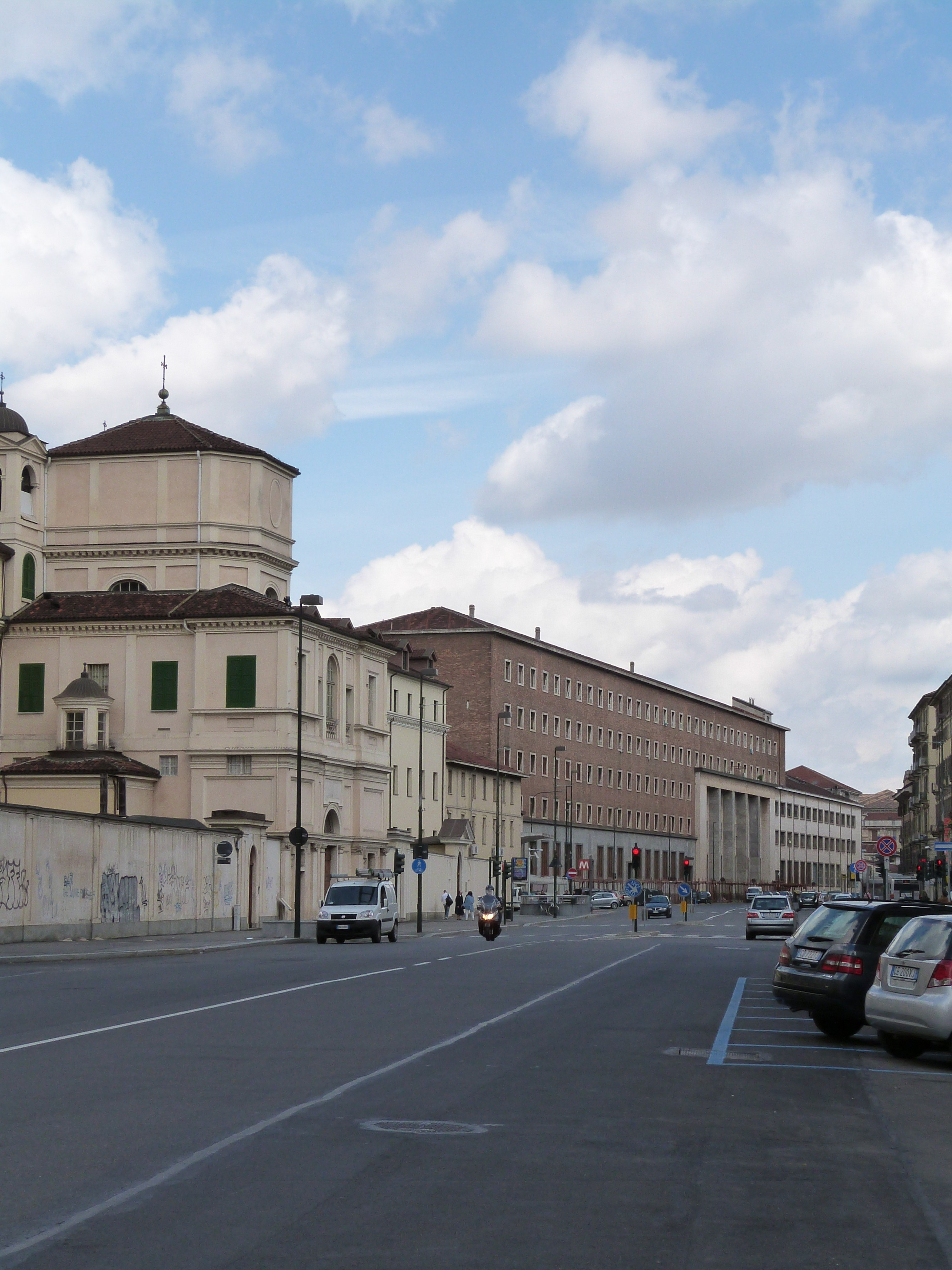 Via Nizza, zona San Salvario, Torino